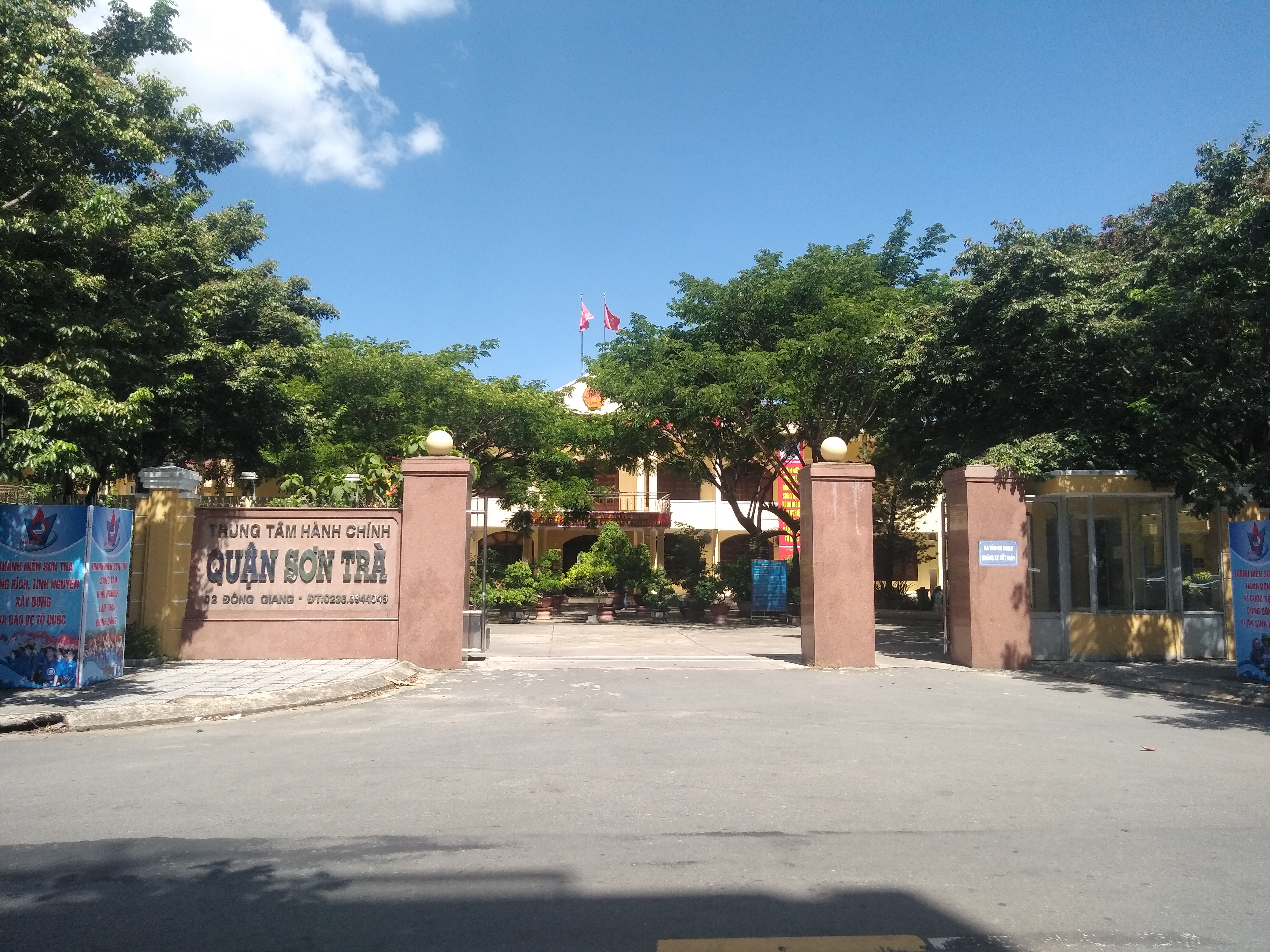 Trung tâm Hành chính quận Sơn Trà 2